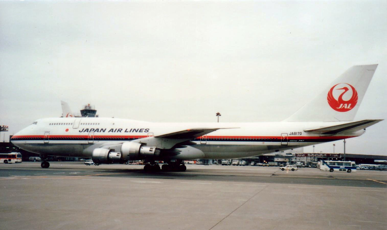 日本航空B747-100B SUD (JA8170)